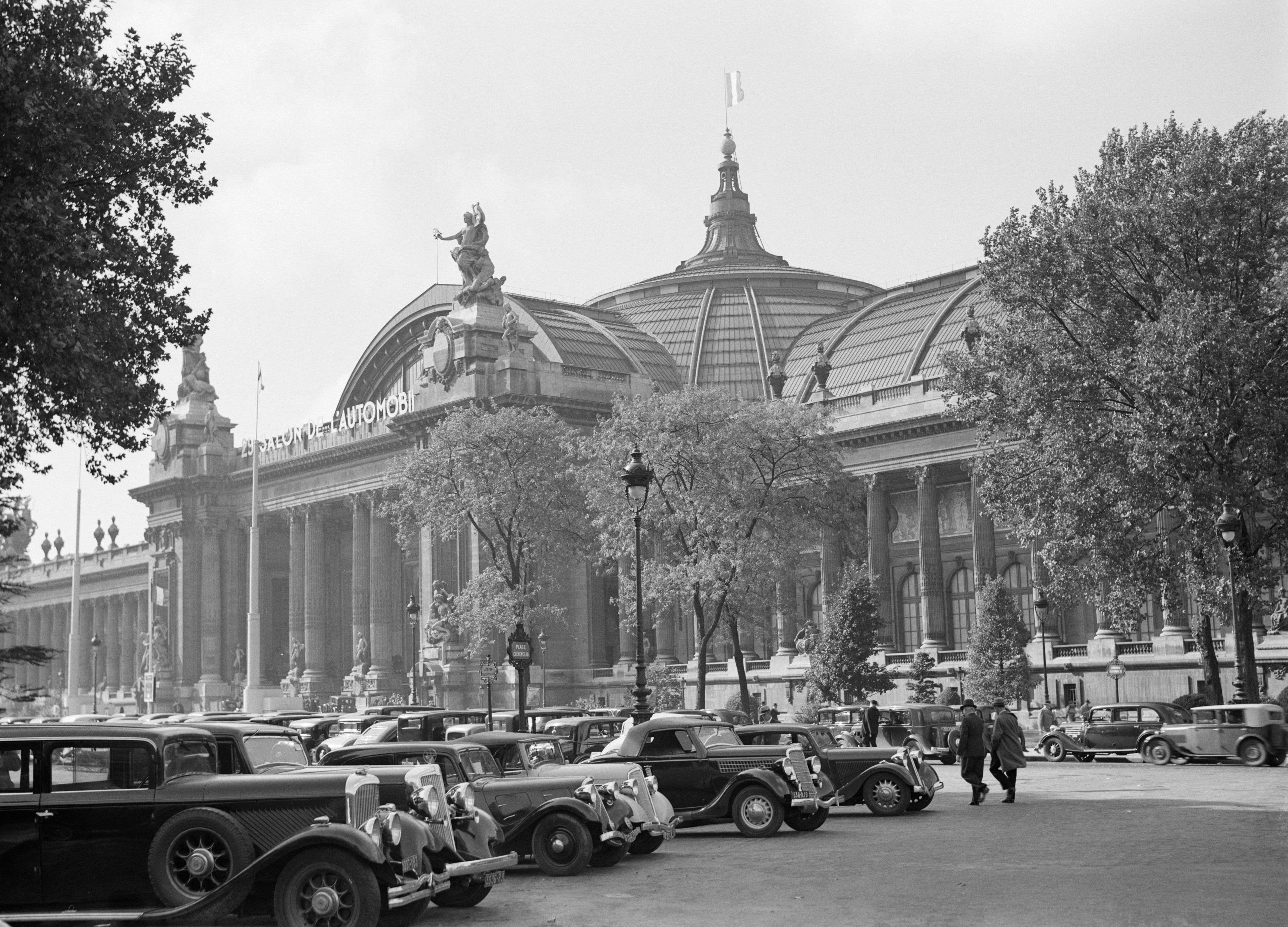 Collectie / Archief : Fotocollectie Van de Poll Reportage / Serie : Reportage Parijs Beschrijving : Geparkeerde auto's voor het Grand Palais tijdens de 29ste Salon de l' automobil Datum : 1935 Locatie : Frankrijk, Parijs Trefwoorden : auto's, tentoonstellingen Fotograaf : Poll, Willem van de Auteursrechthebbende : Nationaal Archief Materiaalsoort : Glasnegatief Nummer archiefinventaris : bekijk toegang 2.24.14.02 Bestanddeelnummer : 191-0382